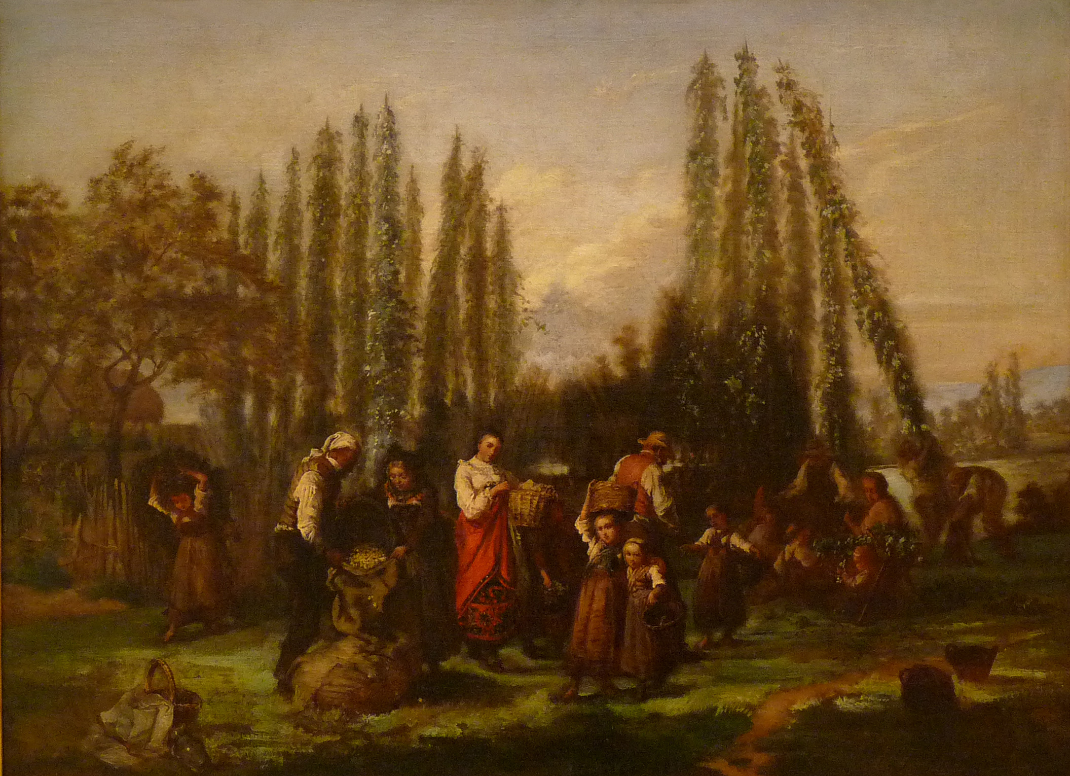 La cueillette du houblon en Alsacelabel QS:Lfr,"La cueillette du houblon en Alsace"